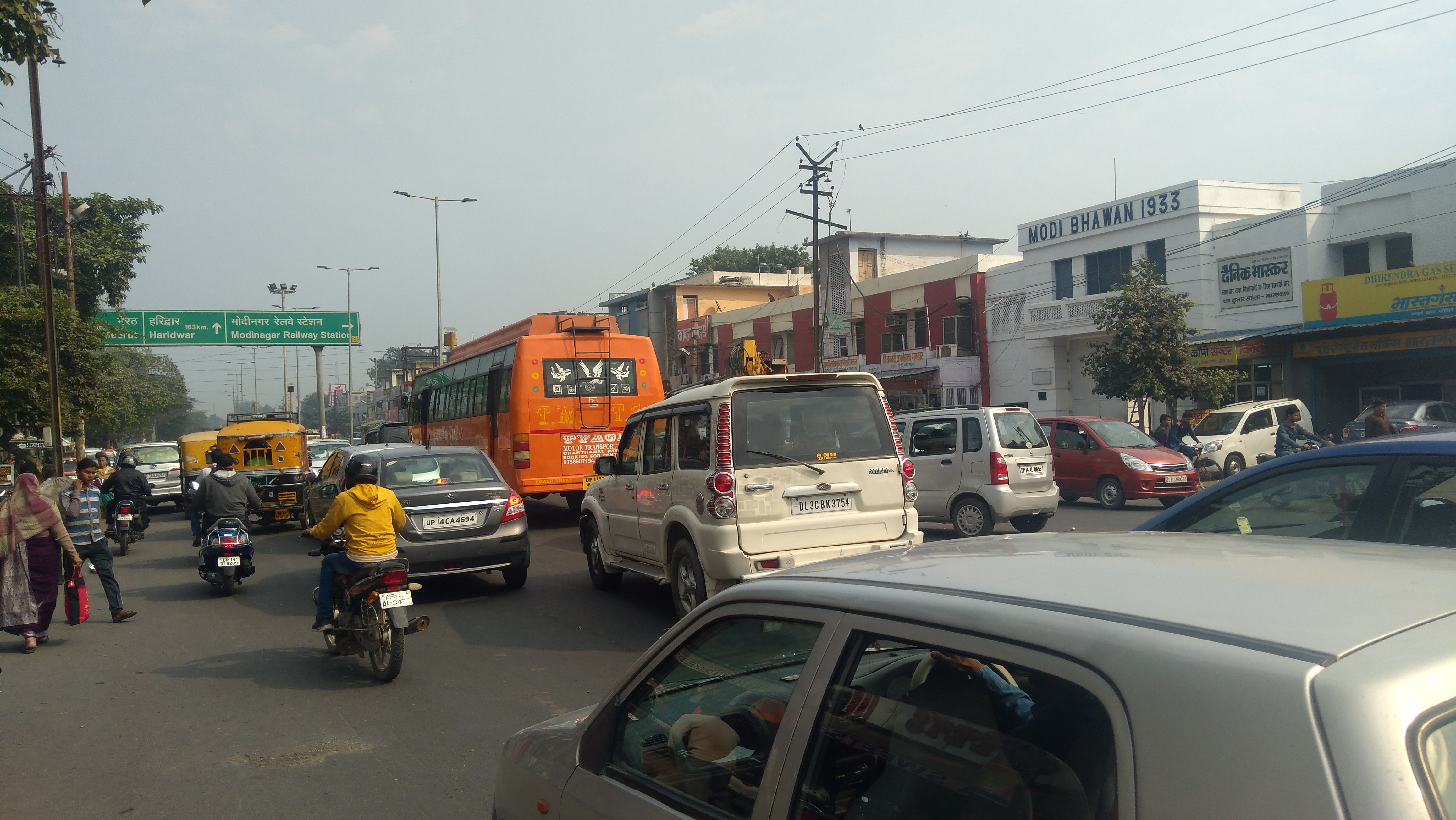 Modinagar main market on NH-58